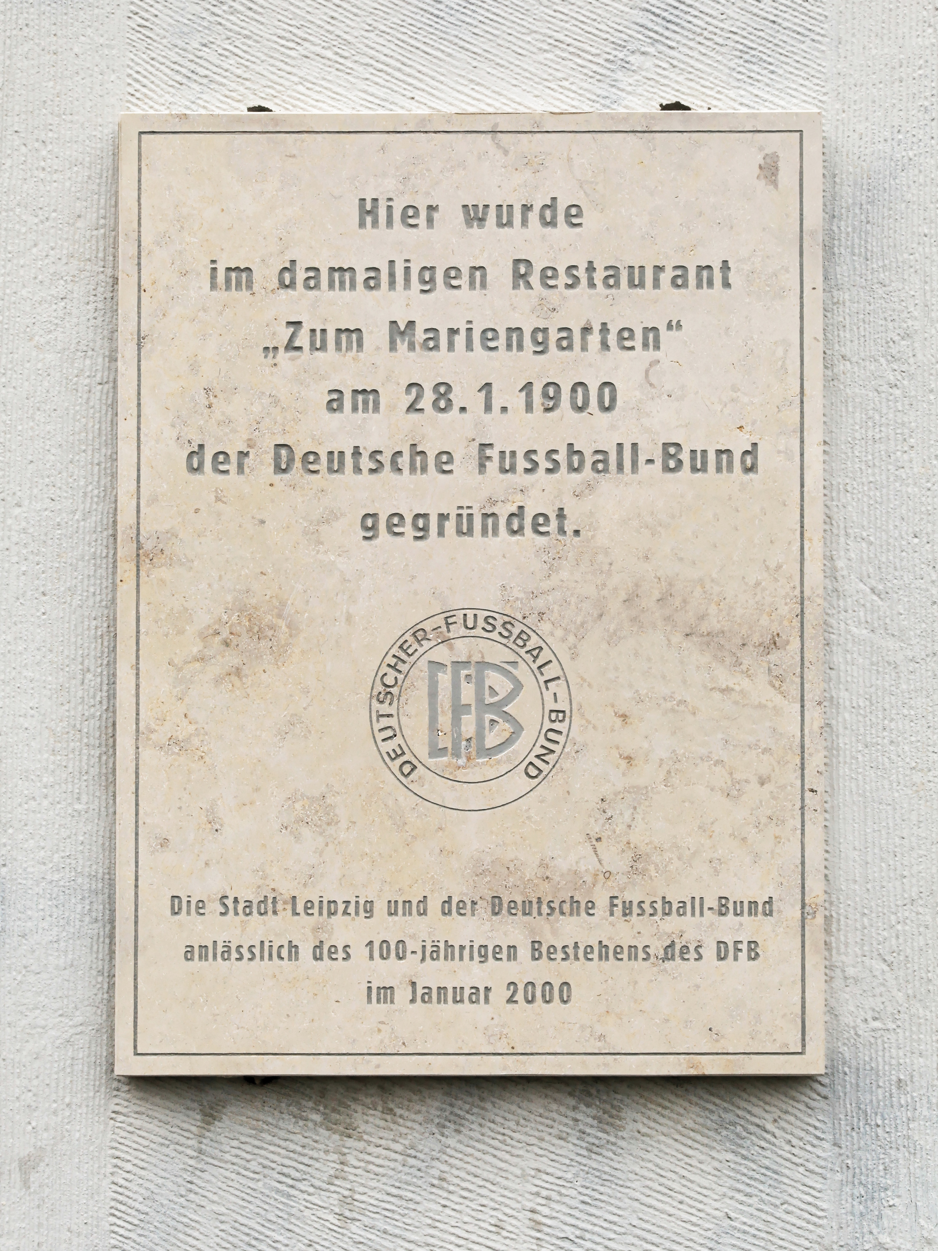 Tafel zu Gründung des DFB, Büttnerstraße 10 in Leipzig (Graffiti der Originalaufnahme beseitigt)